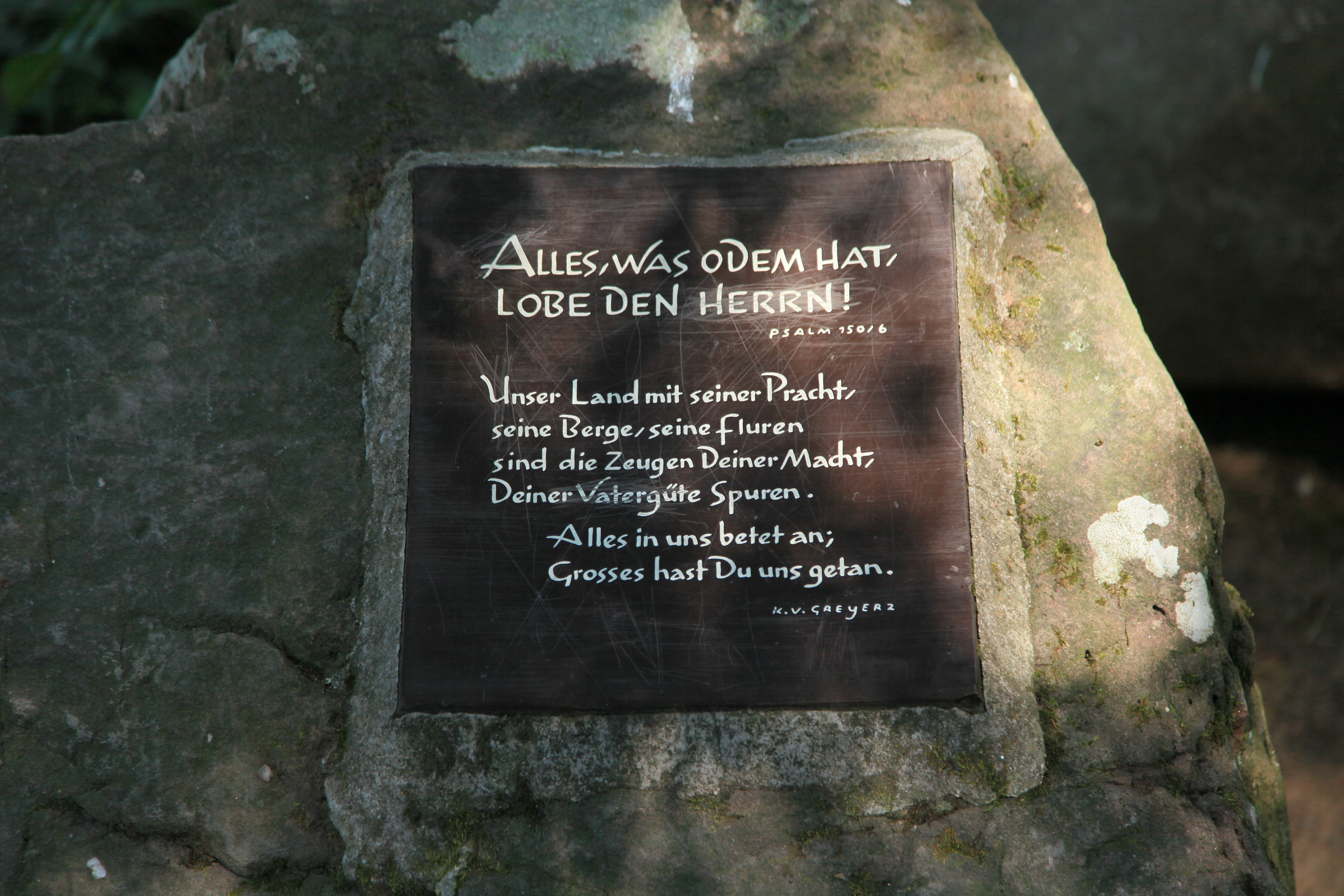 Auf dem Sommerberg (nahe Emmaweg) in Bad Wildbad